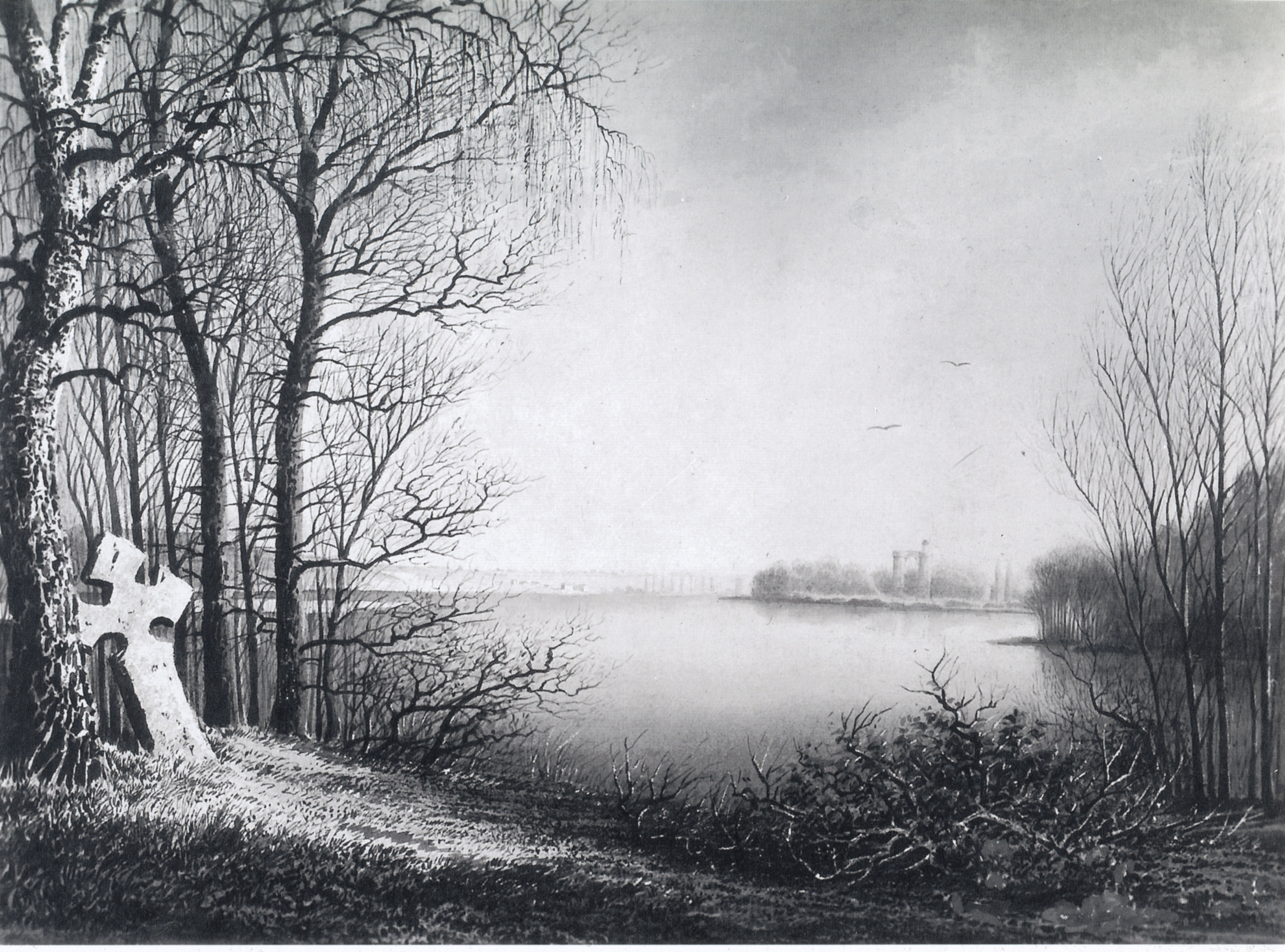 Blick von der Jägerhof-Partie zur Pfaueninsel (Julius Hennicke, um 1852)